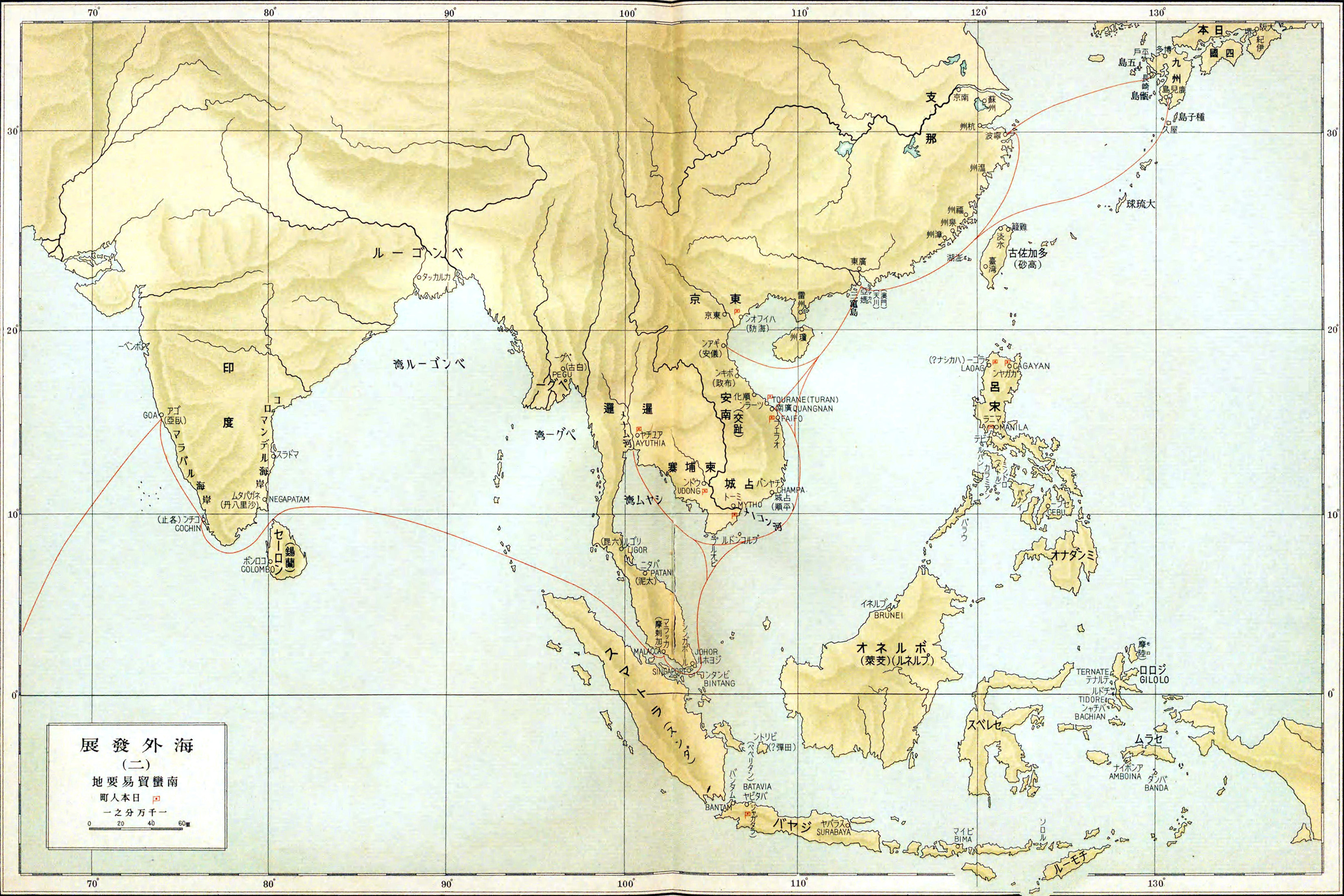 海外発展（南蛮貿易要地/日本人町）、『大日本読史地図』より。富山房（出版年：1935年）